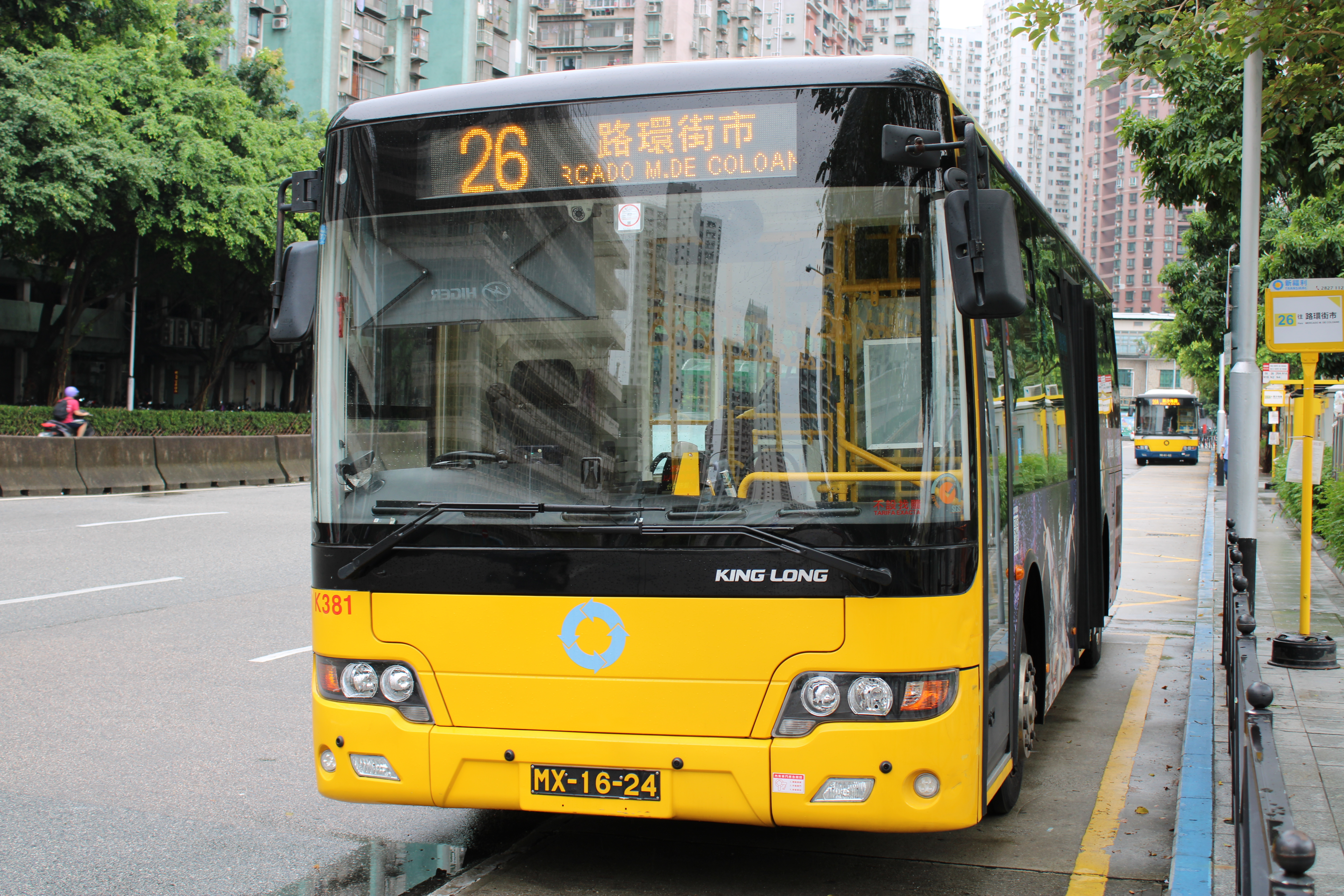 新福利2017年蘇州金龍KLQ6960GQE5行駛26路線。